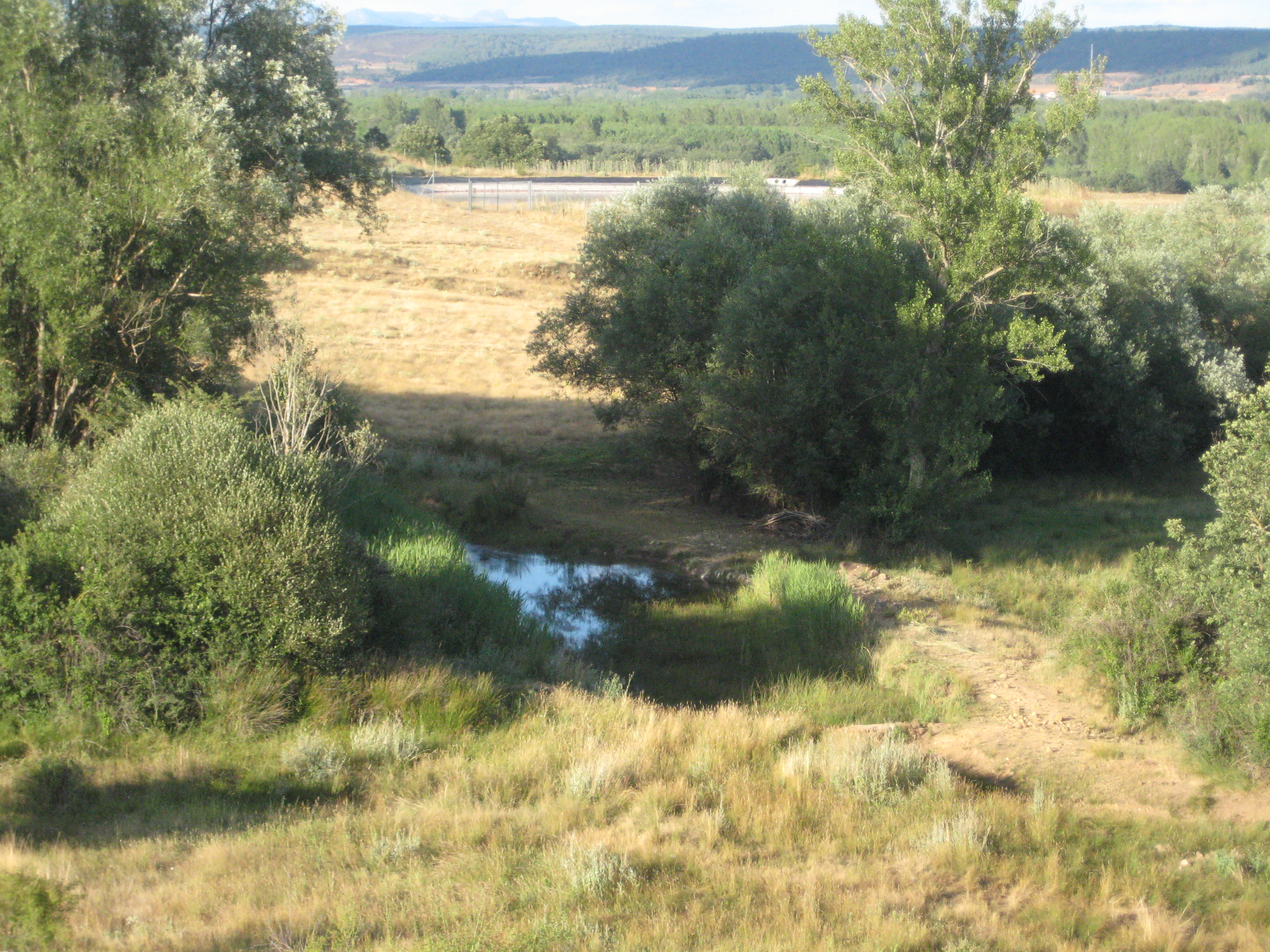 La pecina